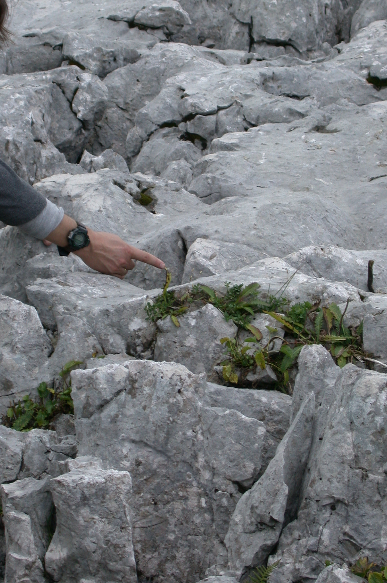 Moos im Karstgebiet des Dürrenstein, in Niederösterreich.